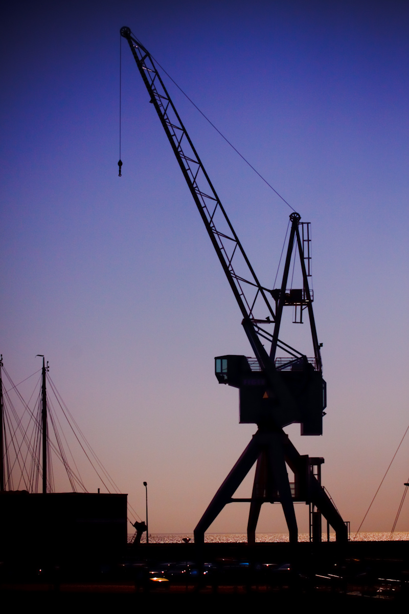 Crane Harlingen